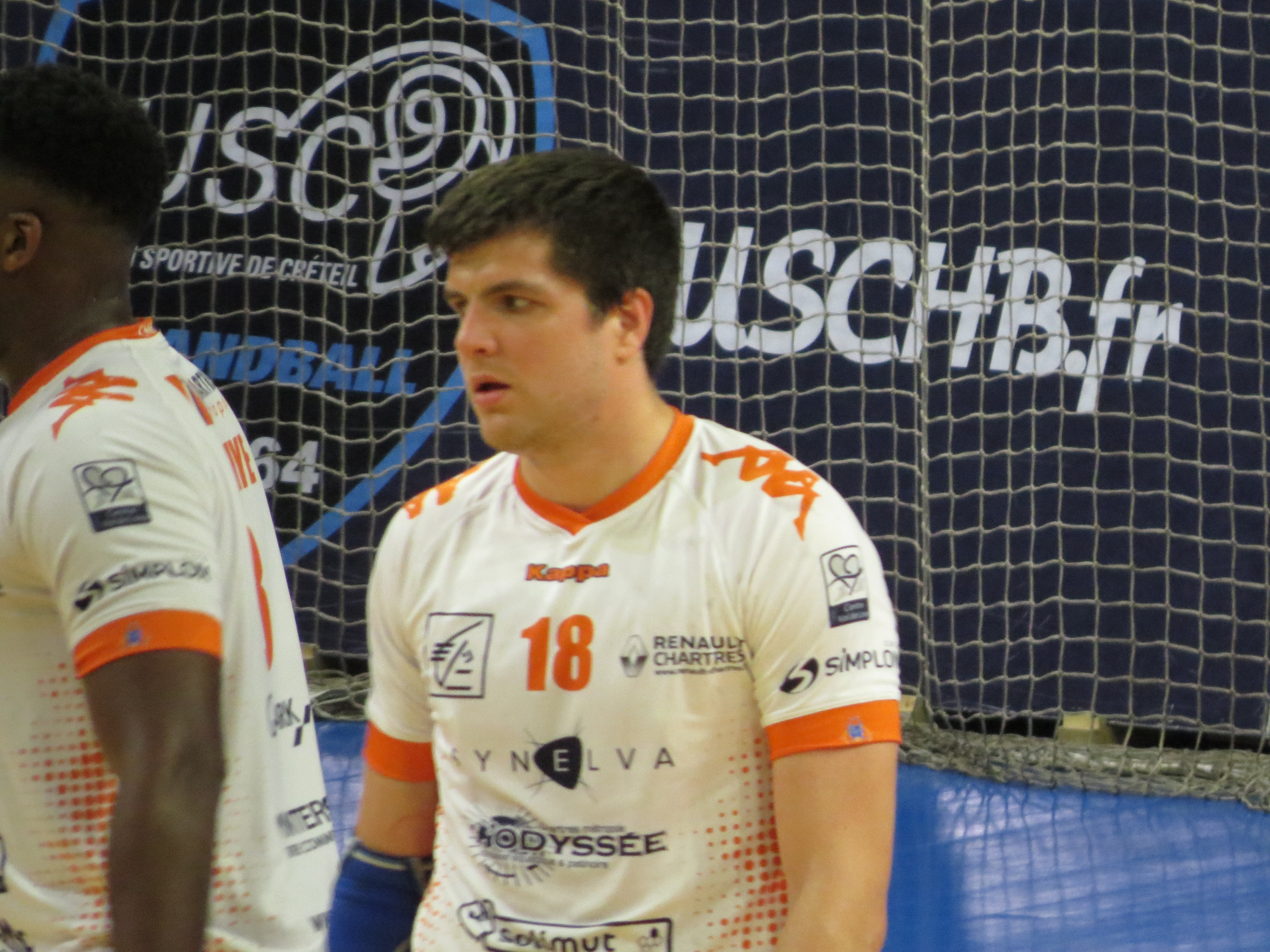 Match du championnat de France de Hand entre Créteil et Chartres Victoire de Créteil 39 - 35 18 : Sergey Kudinov